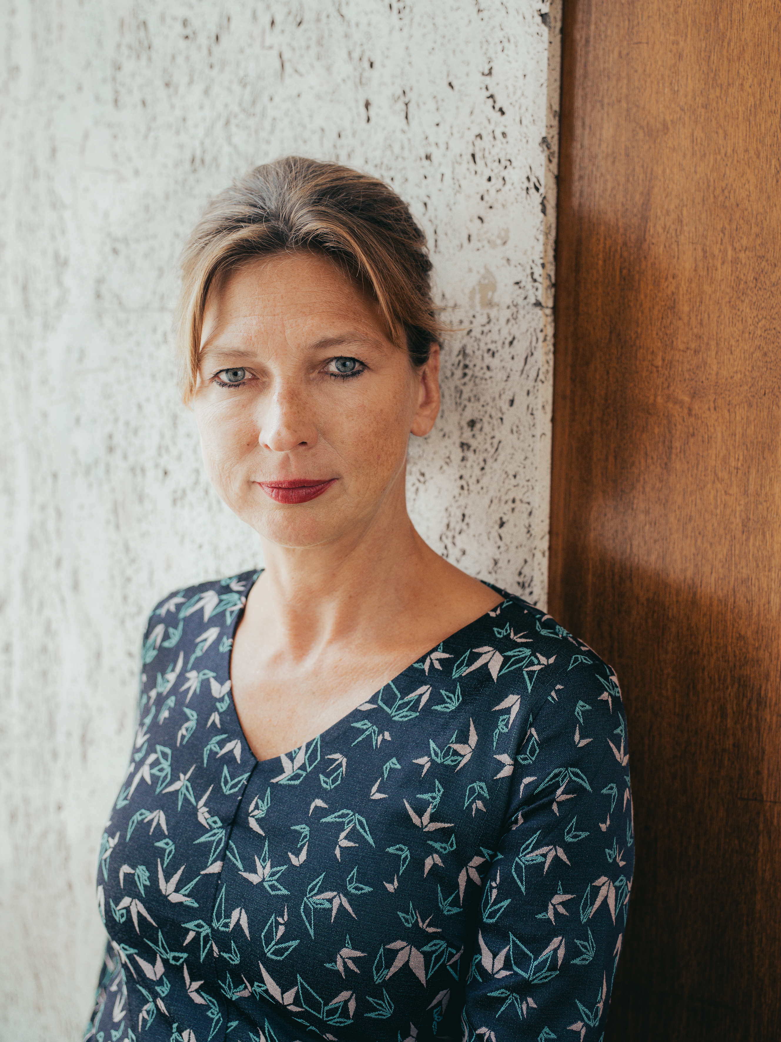 Iris Laufenberg